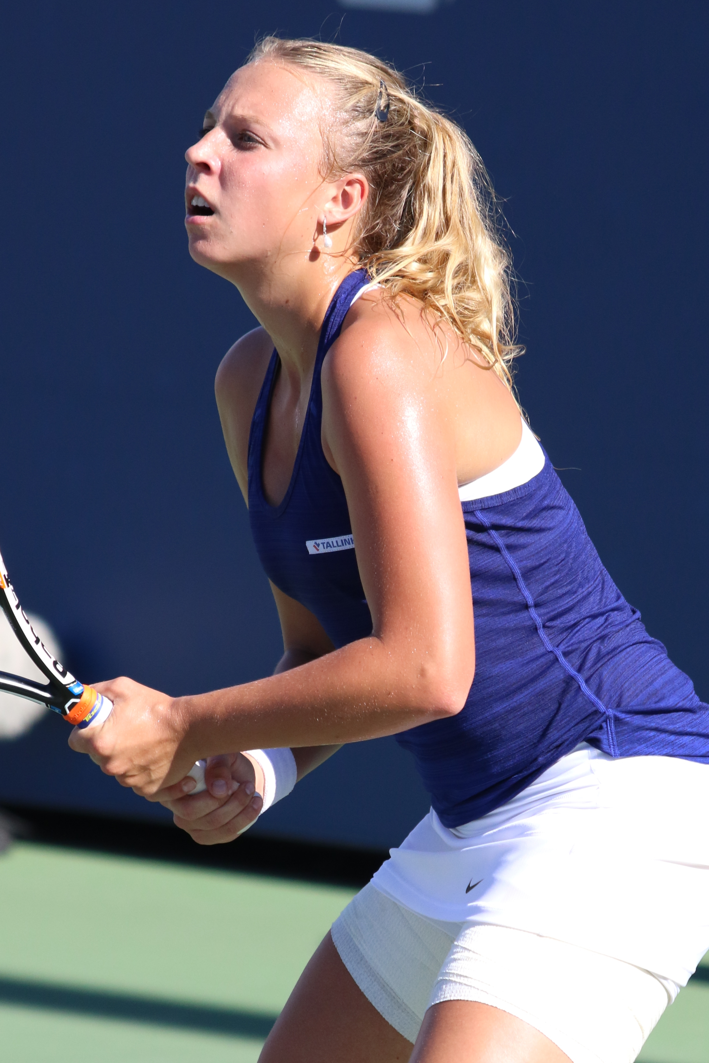 Kontaveit US16 (23)